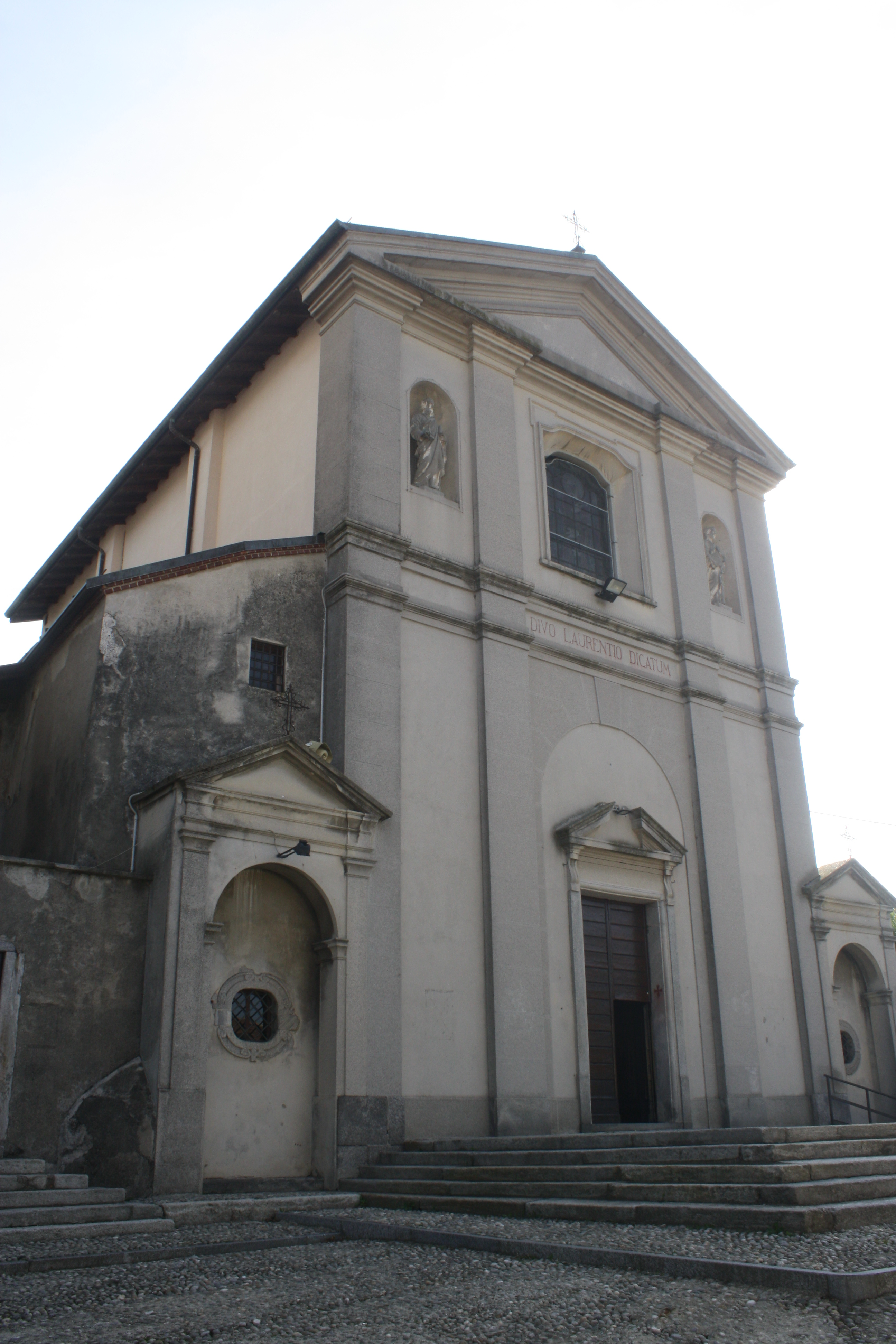 La facciata della chiesa di San Lorenzo a Sumirago.